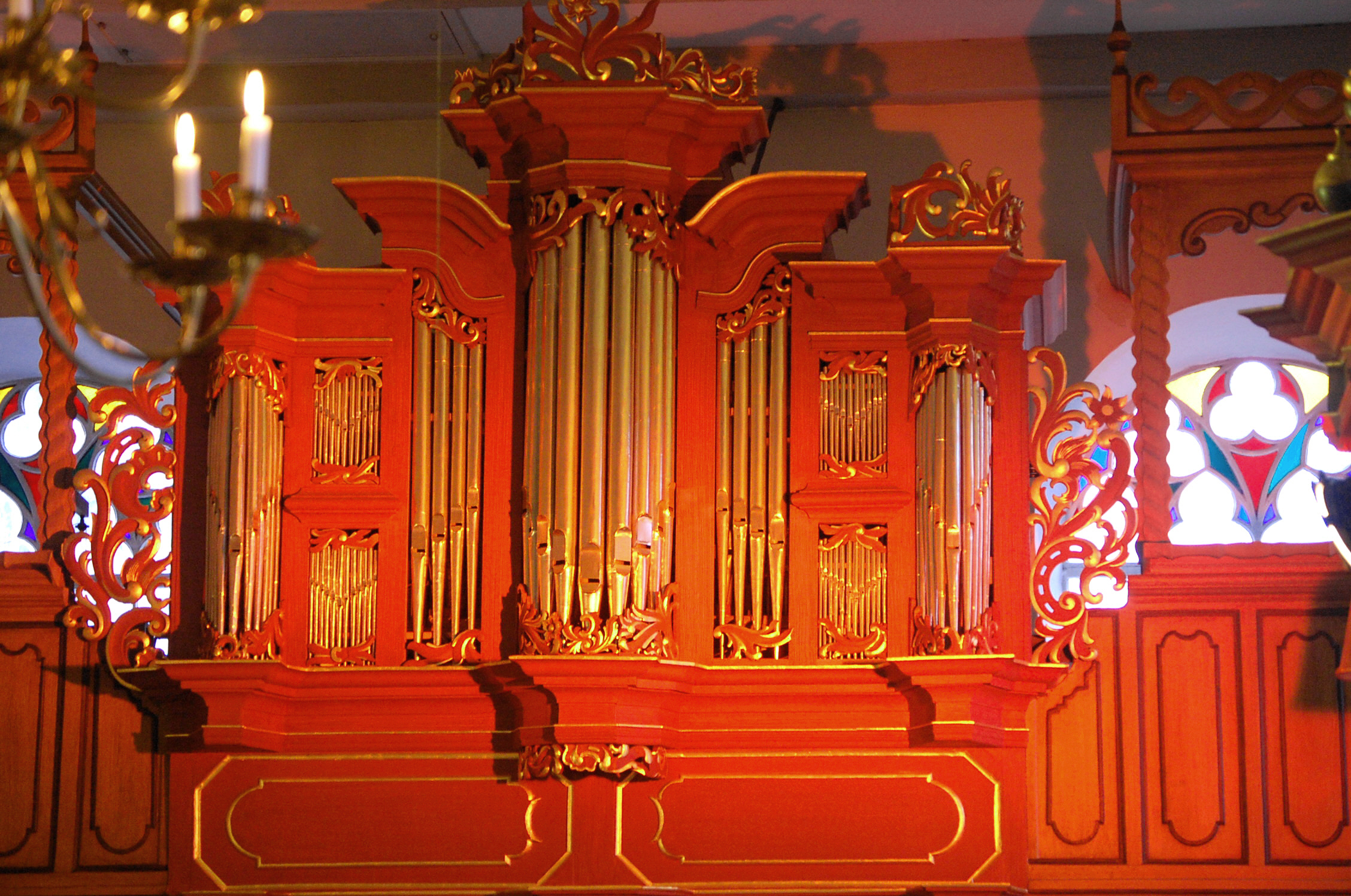 Pogum, Orgel